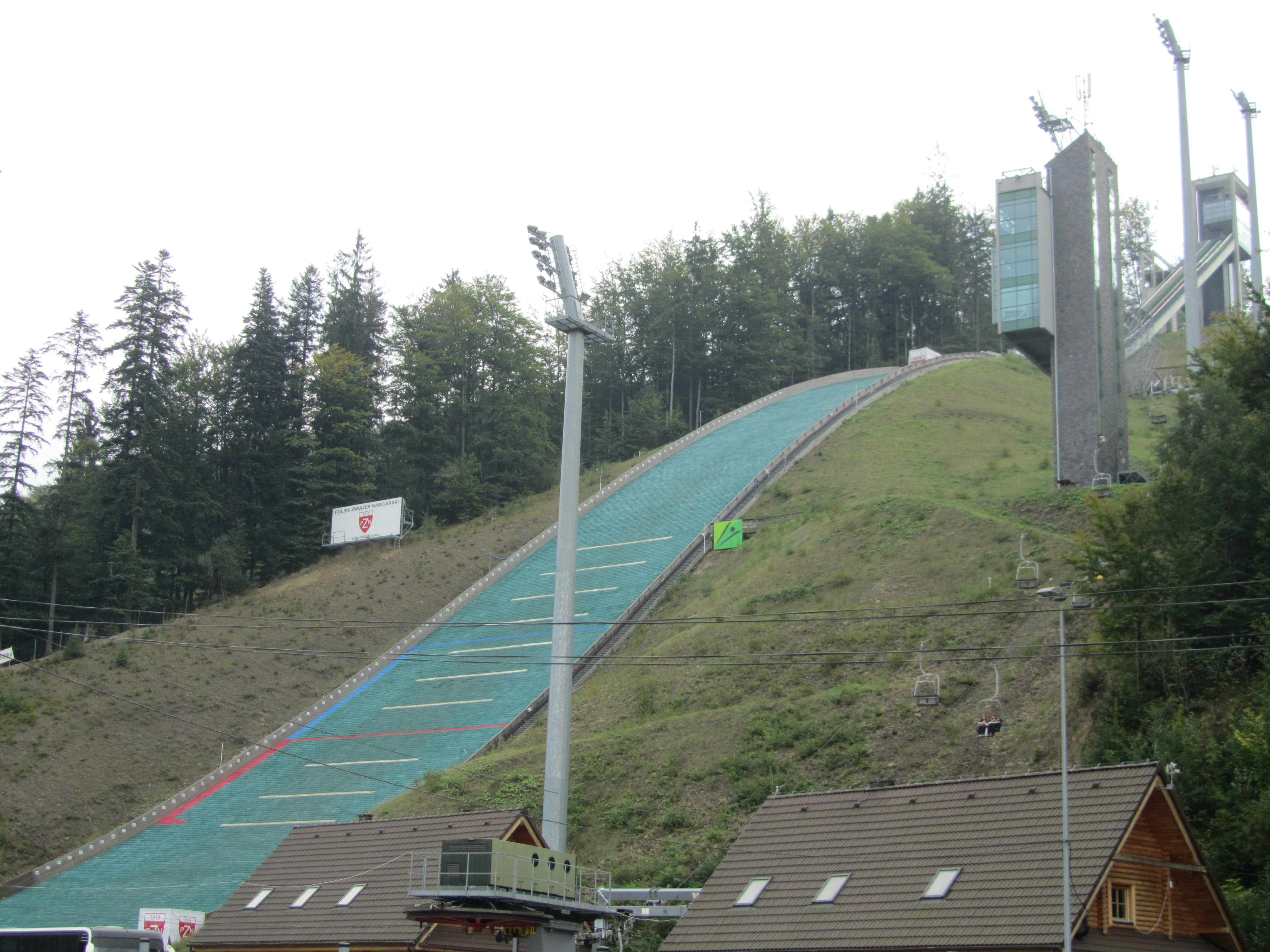 WISŁA MALINKA. SKOCZNIA IM.ADAMA MAŁYSZA.